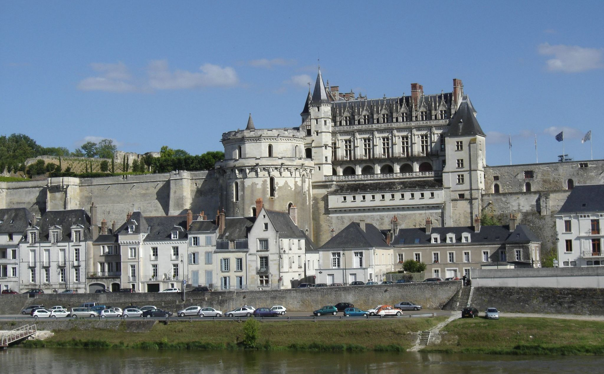 Schloss Amboise, Ansicht von Nordwesten